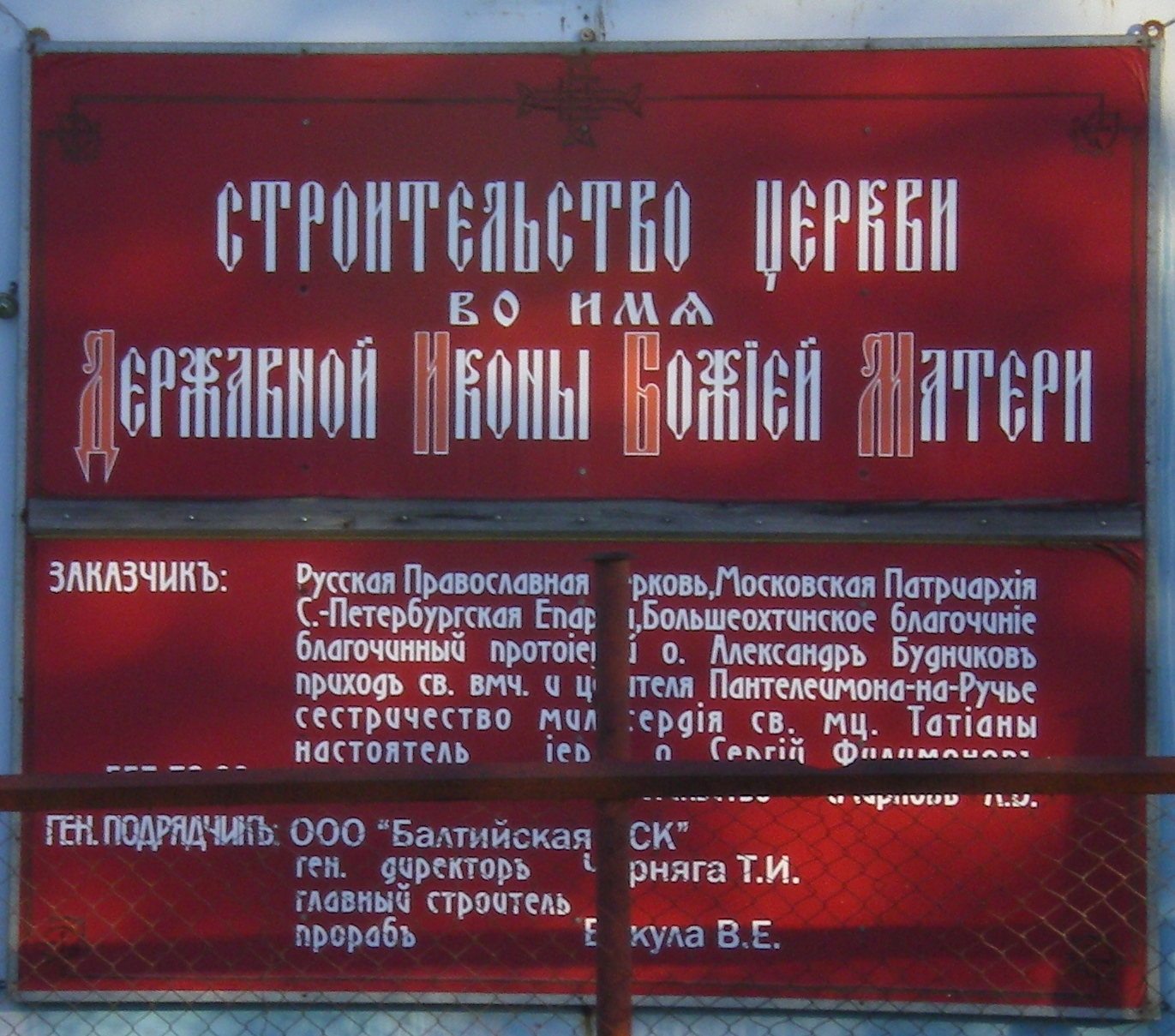 Аншлаг строительства Церкови во имя Державной иконы Божией Матери